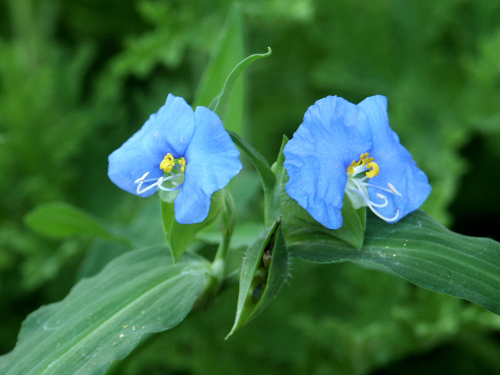 Commelina erecta (slender dayflower), seen in a graden in Israel